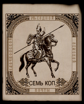 Почтовая марка несуществовавшего Клочковского (Клочковской слободы) земства Харьковской губернии. Реконструкция (отредактированная копия) изображения File:Kharko.jpg гравюры казака Харько 19 века, 2009. (обработанный свободный рисунок XIX century)